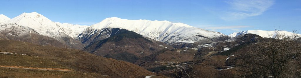 Vistes desde Perves